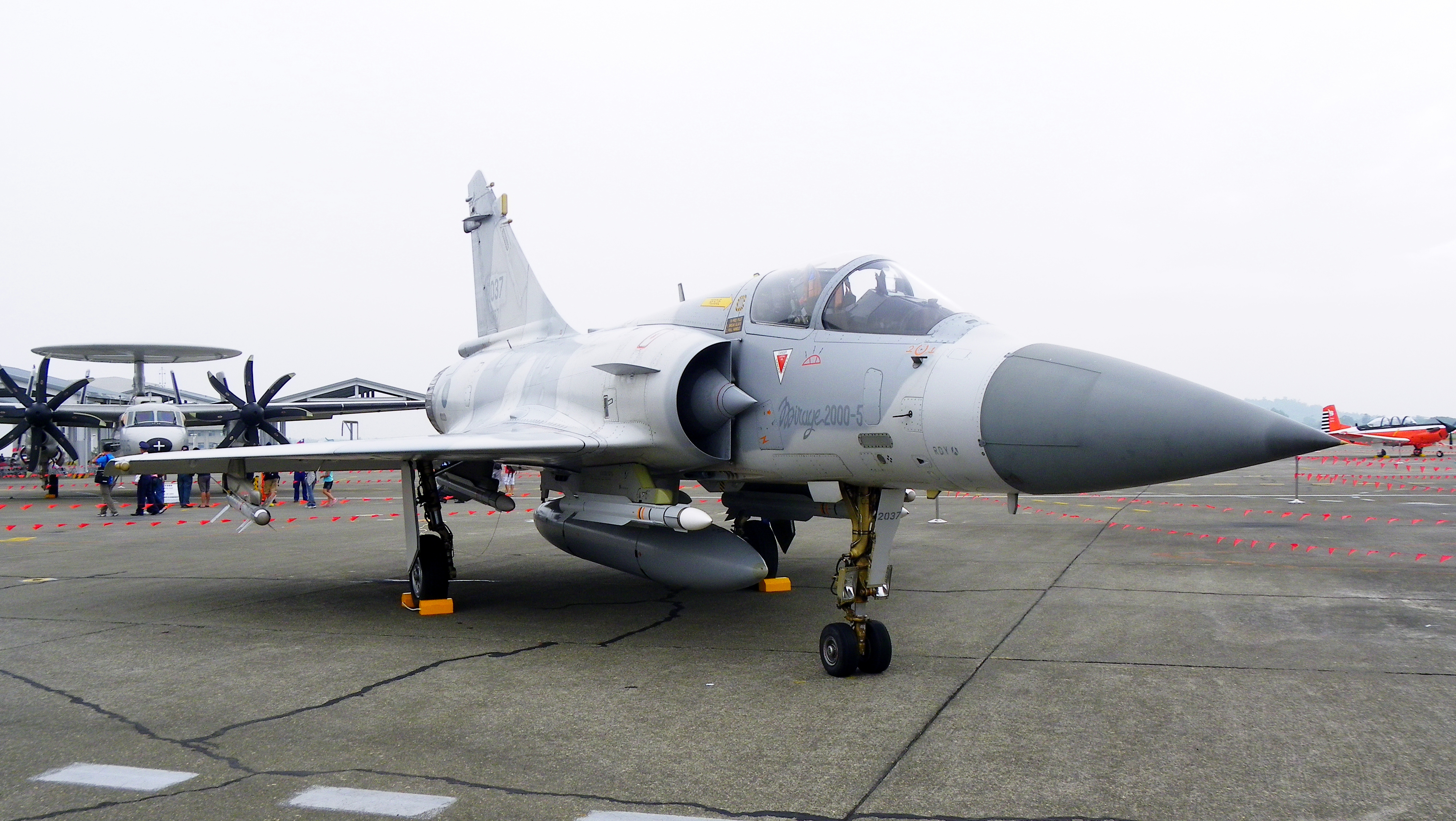 幻象2000-5EI 2037戰鬥機右斜前方，攝於2011年空軍岡山基地營區開放活動。